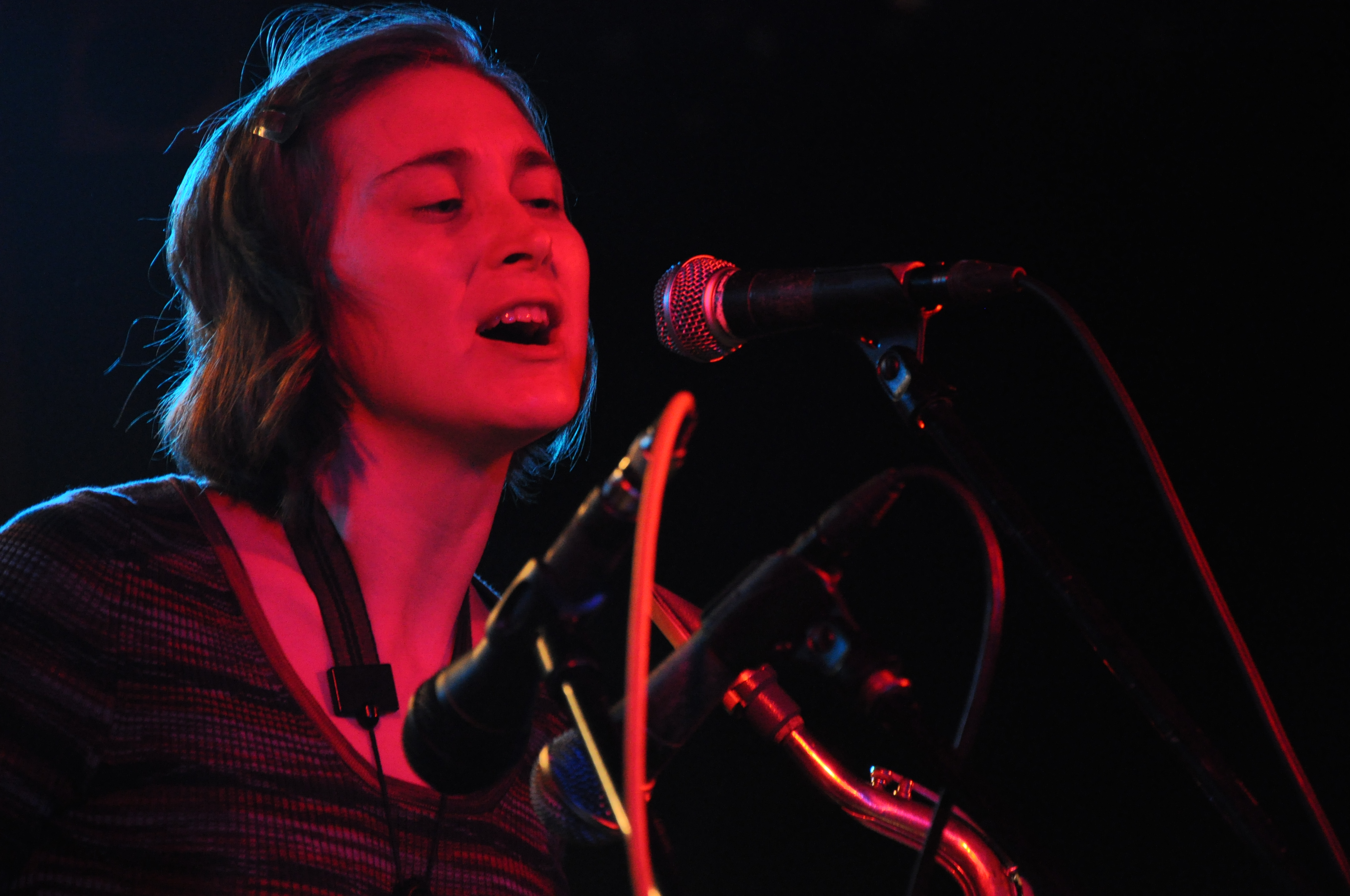 Bára Kratochvílová